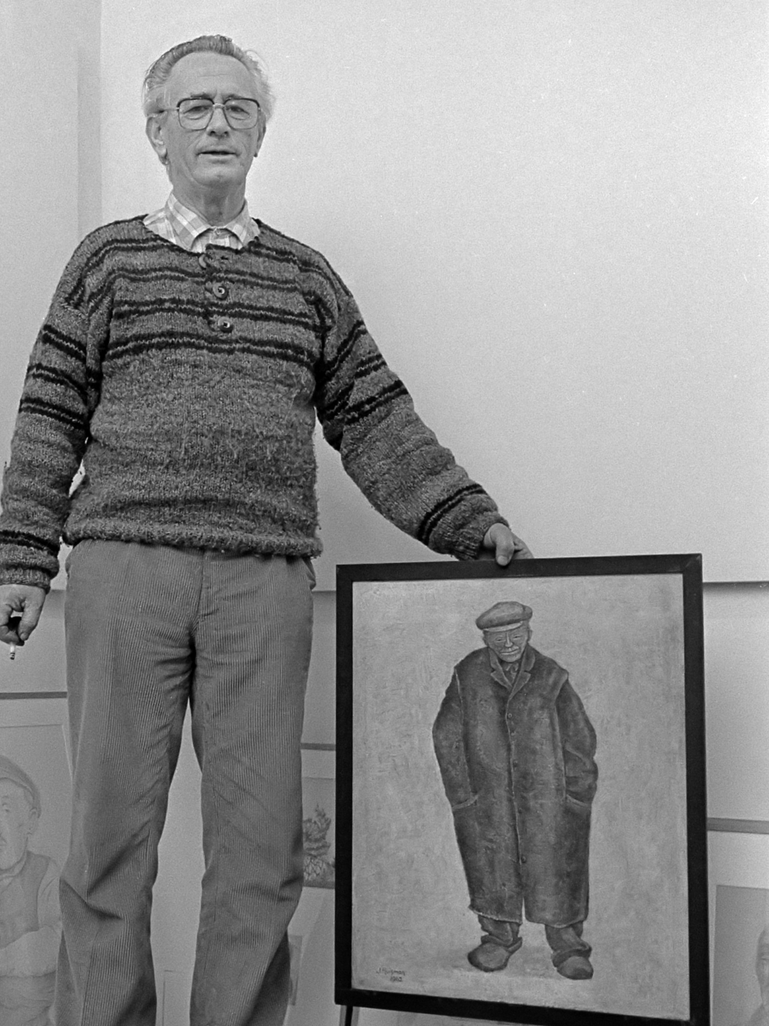 Jopie Huisman in het Jopie Huismanmuseum te Workum 9 april 1986